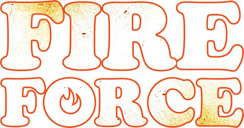 Logo français du manga Fire Force